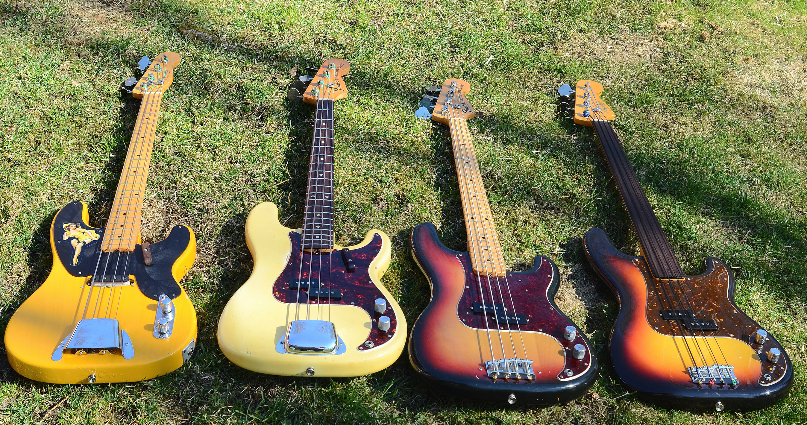 P-Basses